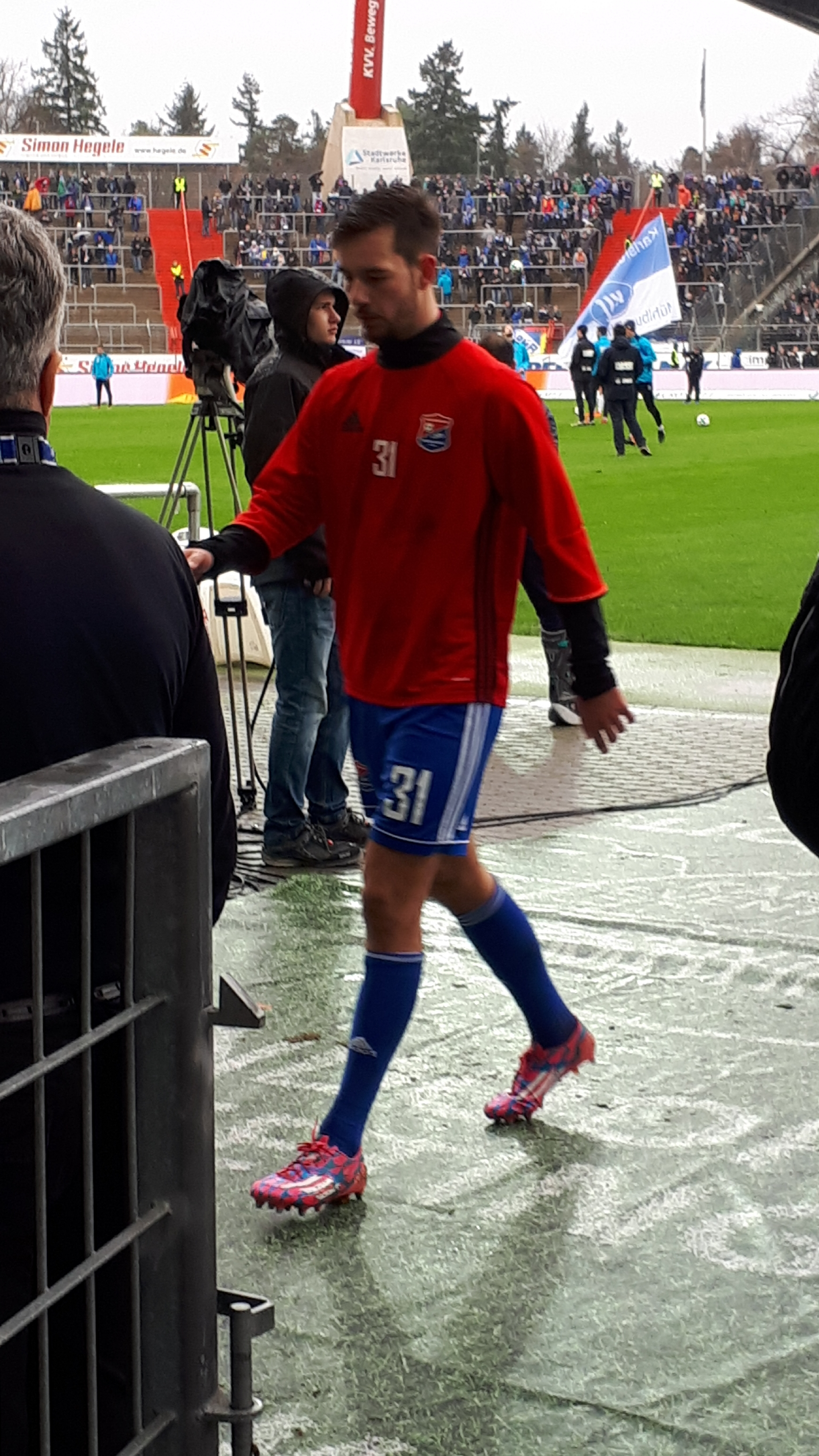 Fußballspieler Orestis Kiomourtzoglou beim Heimspiel des Karlsruher SC gegen die SpVgg Unterhaching am 20. Januar 2018.